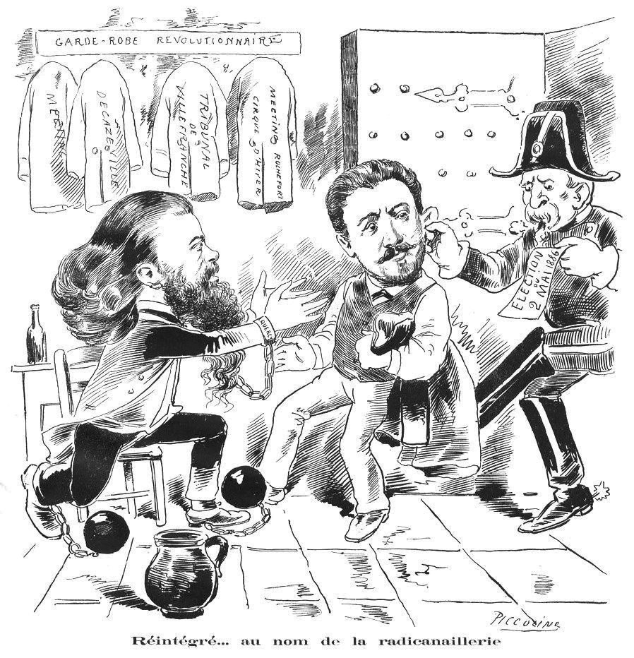 "Réintégré... au nom de la radicanaillerie".